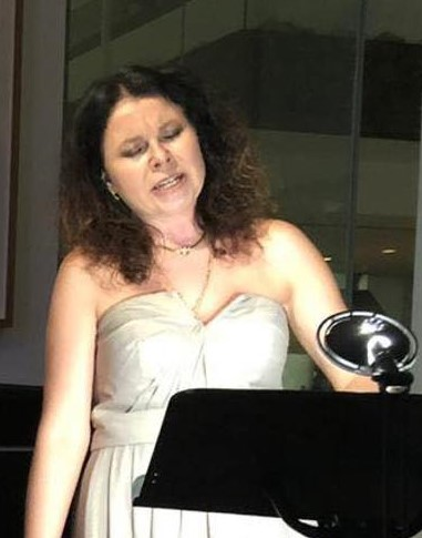 8 października 2019 Fundacja Pharos Art we współpracy z Ambasadą RP w Nikozji zorganizowała recital wybitnej, polskiej kompozytorki i wokalistki Agaty Zubel, której akompaniował na fortepianie utalentowany pianista młodego pokolenia Krzysztof Książek